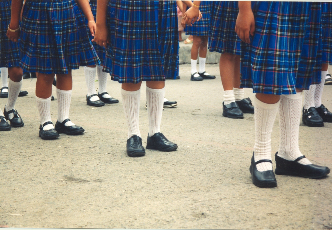 Schuluniformen (hier für Mädchen) sind auch in Mexiko noch immer Pflicht. Hier findet ein Gedenkmarsch zu Ehren des mexikanischen Unabhängigkeitskämpfers Morelos statt. Caracuaro, Mexiko, Sommer 2004